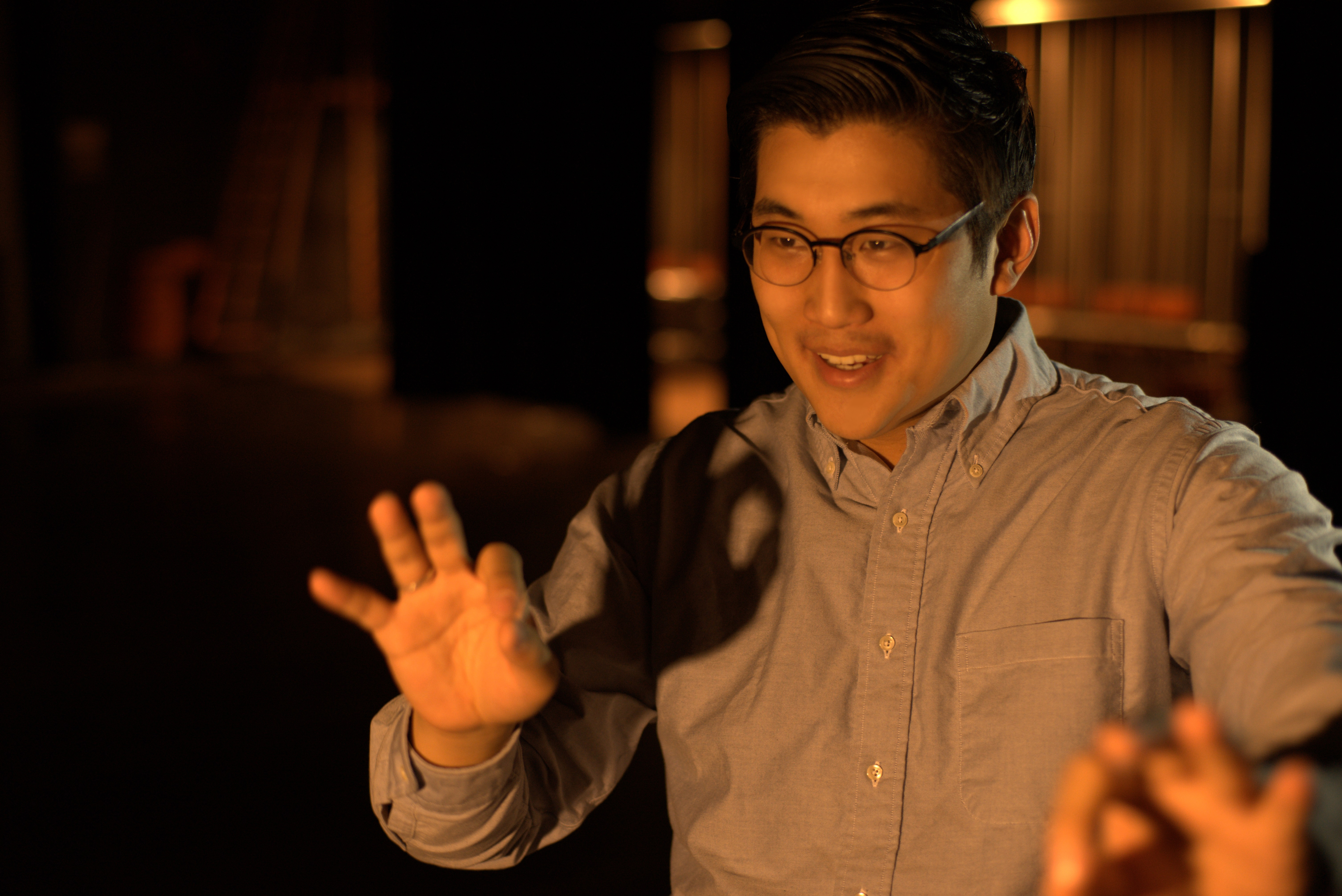 김현준 연출가